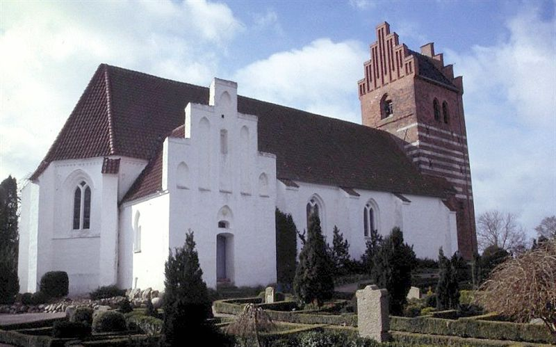 Kongsted Kirke i Danmark. Kongsted kirke